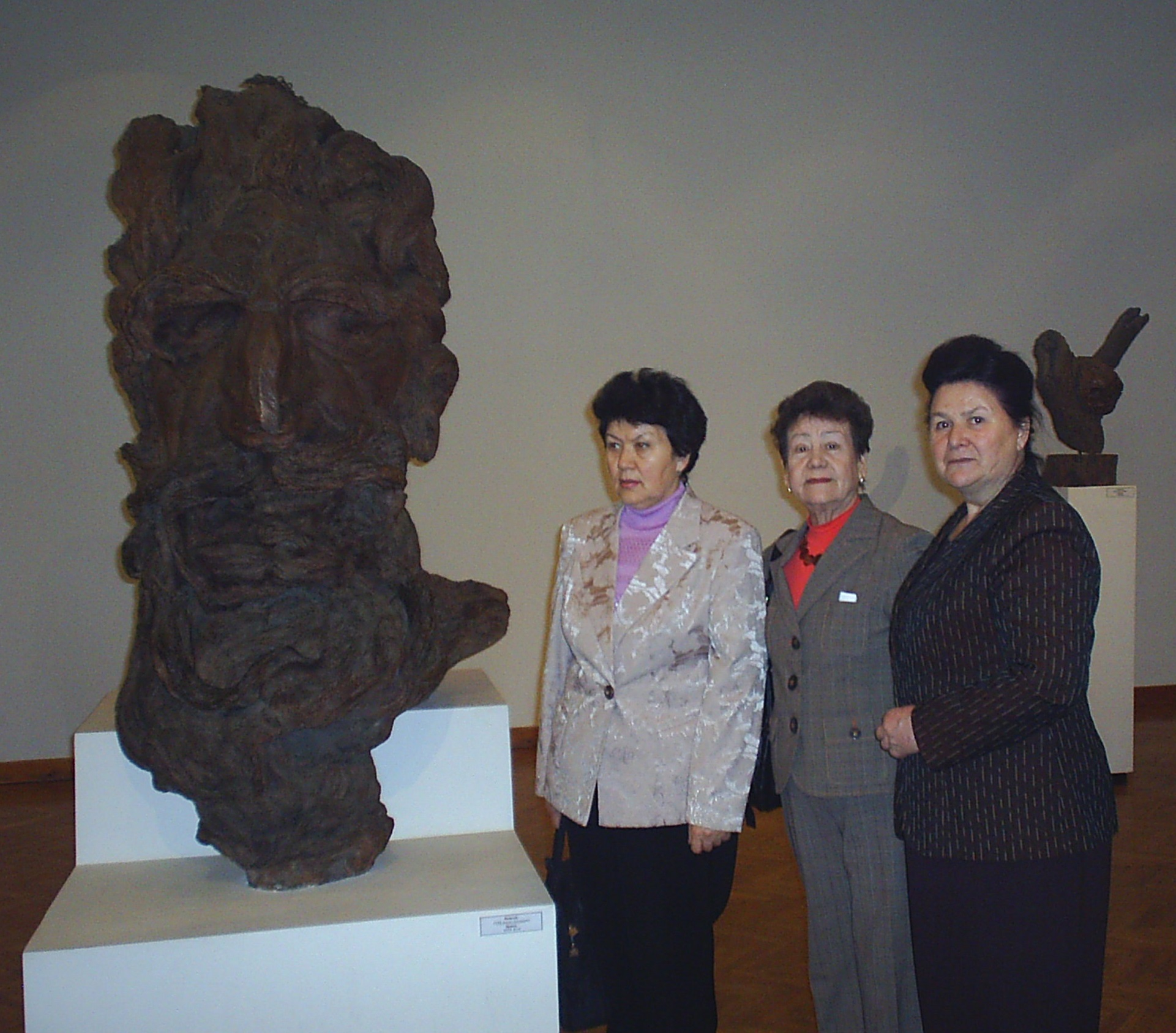 Саранскиҙа С.Д. Эрьзя музейы. Атаҡлы "Моисей" скульптураһы янында Башҡортостан вәкилдәре